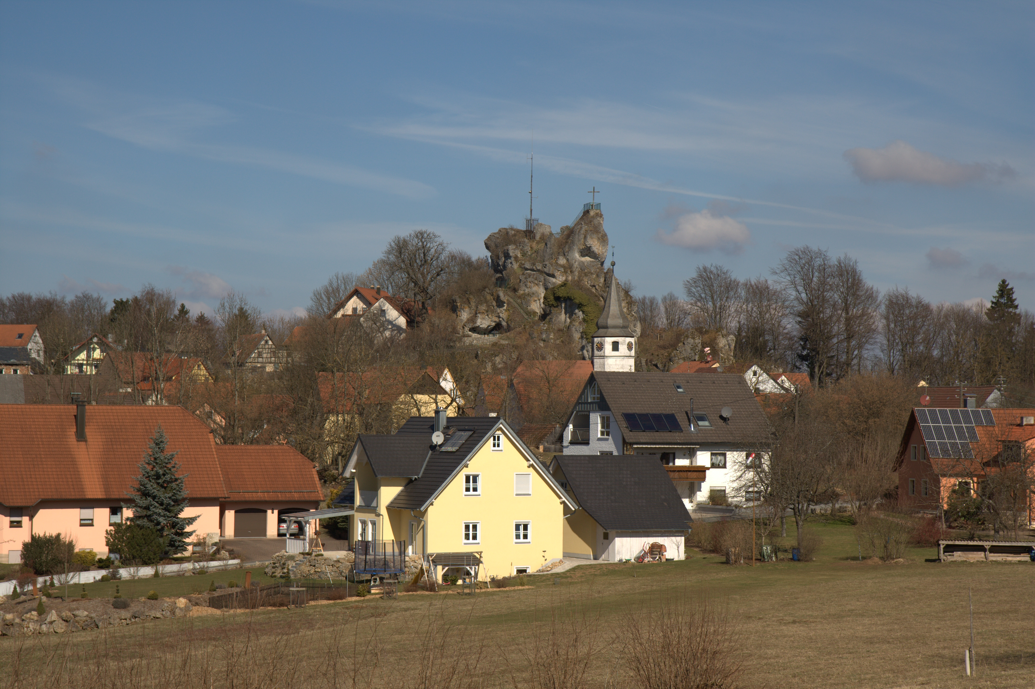 Burgstall Wichsenstein - Ansicht des Burgfelsens über dem Dorf aus südlicher Richtung